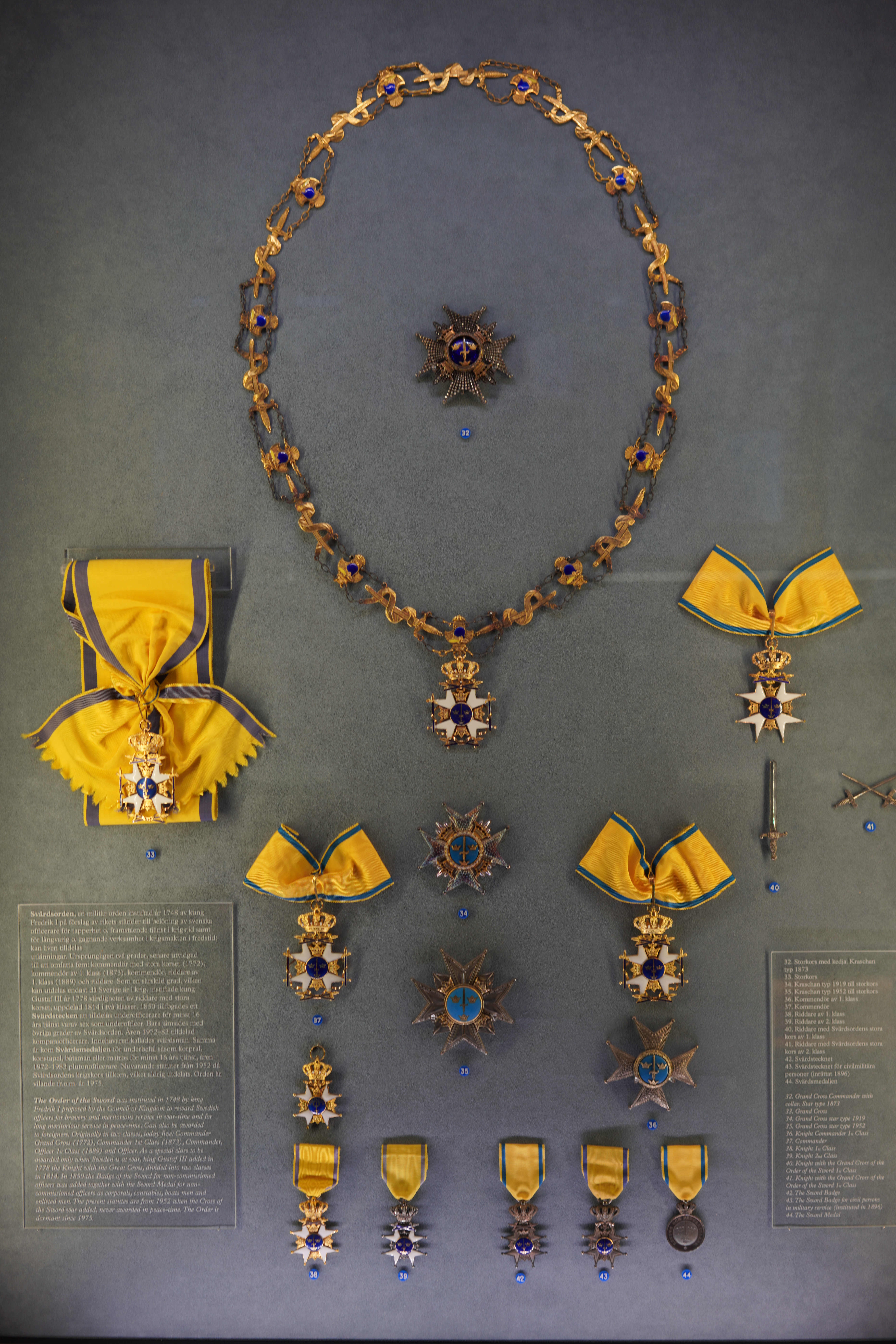 20180624_Slottet_7547